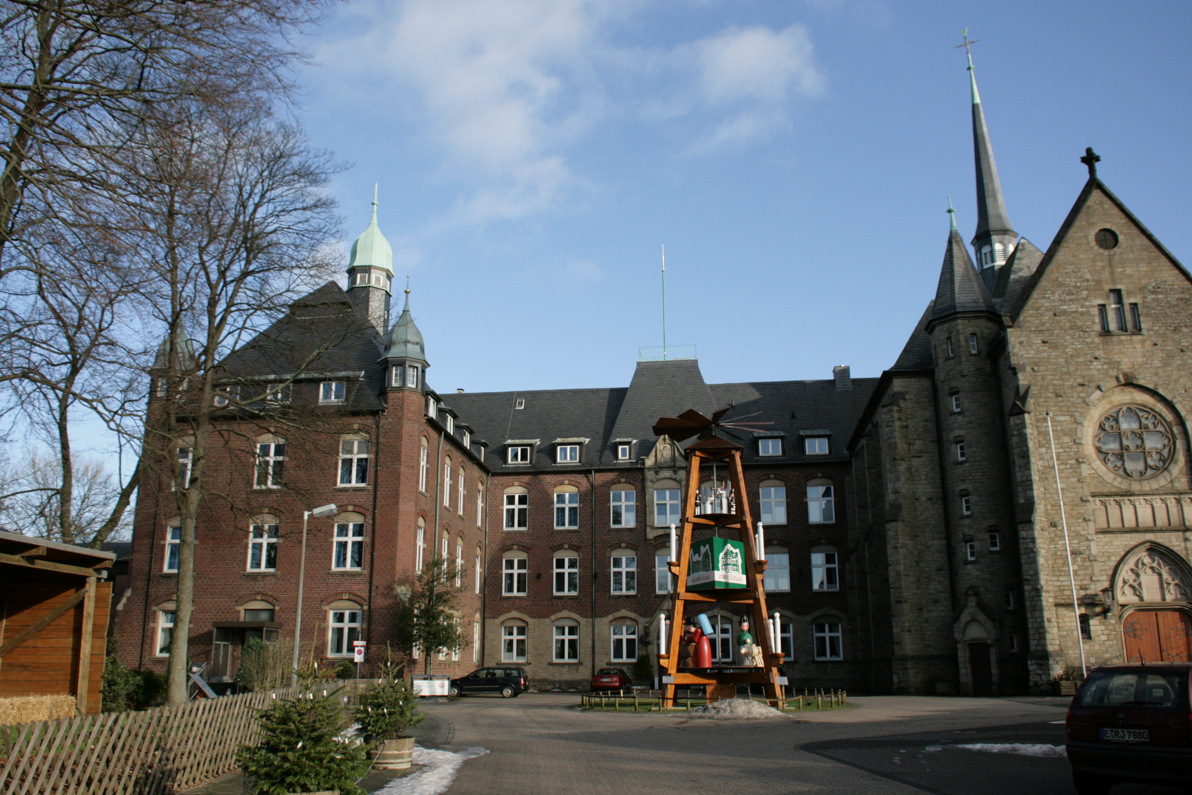 Kamillushaus in Essen-Heidhausen